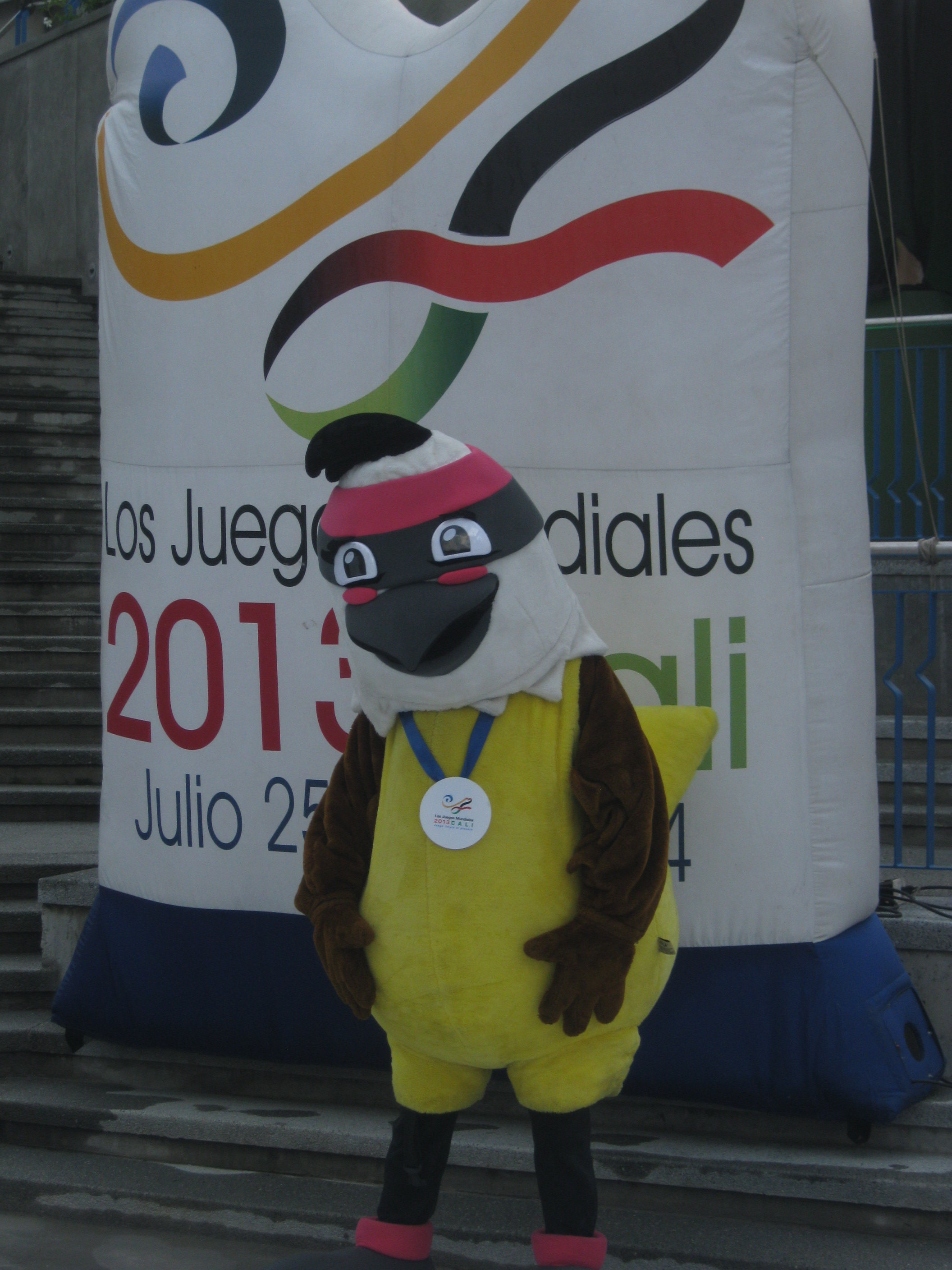 Inauguración de la avenida Colombia y la plazoleta Jairo Varela